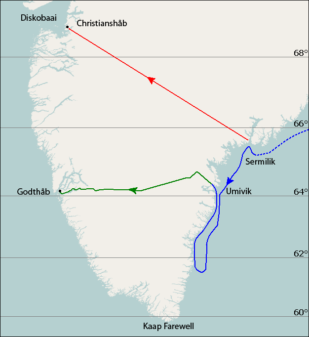 Die blou stippellyn is die skip Jason se vaart van Ysland na Sermilik-fjord, die soliede blou lyn is die vaart wat Nansen en sy reisgenote in twee klein skepe gemaak het om die kus te bereik. Die rooi lyn is die beplande reis van Sermilik in ’n noordwestelike rigting na Christianshåb. Die groen lyn is die werklike reis oor Groenland van Umivik-fjord na Godthåb.